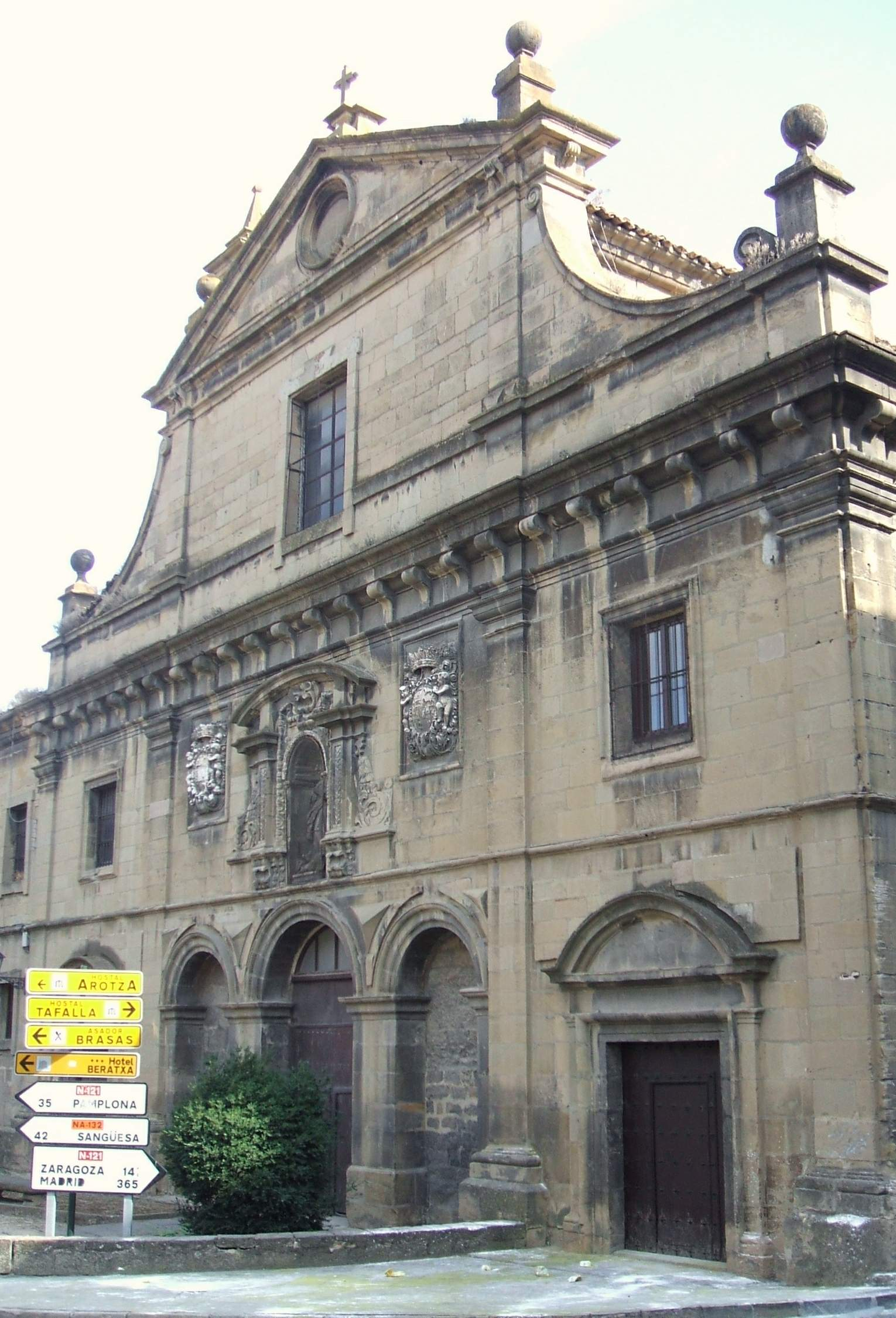 Convento de las Concepcionistas Recoletas o de la Purísima Concepción, en Tafalla (Navarra)